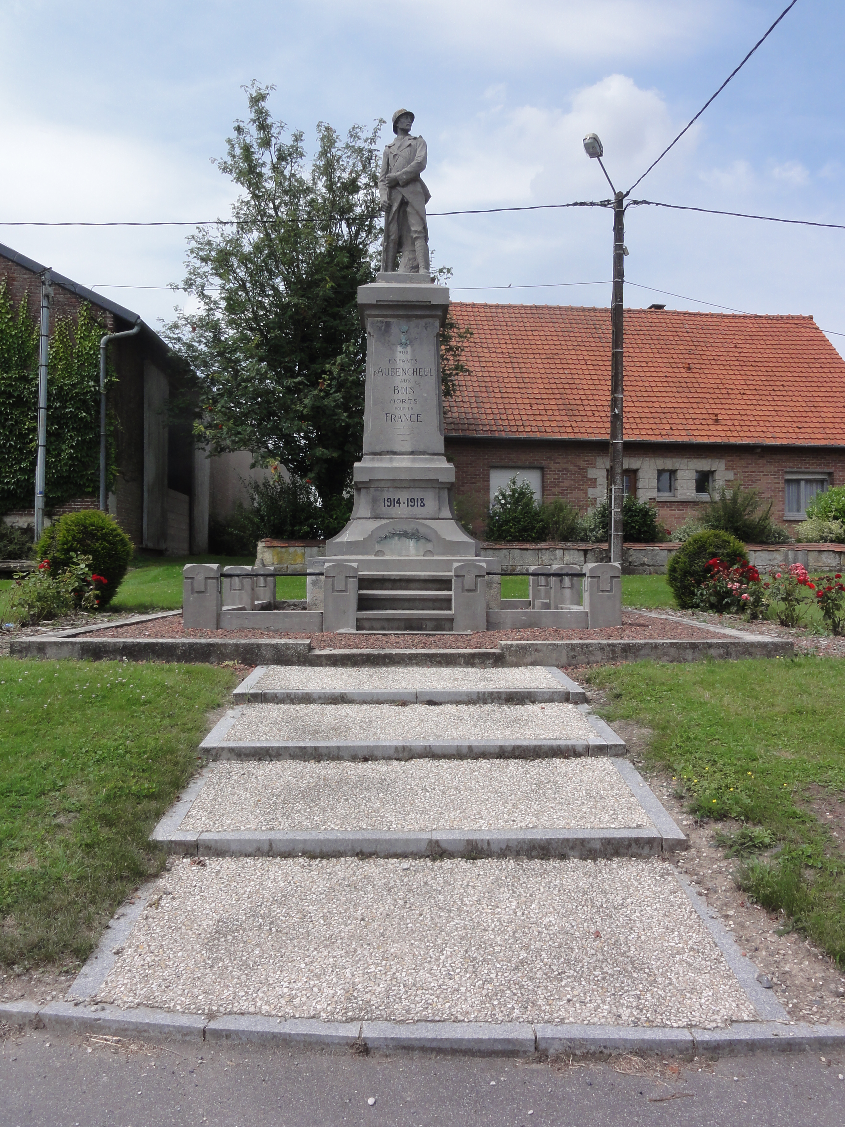 Aubencheul-aux-Bois (Aisne) monument aux morts